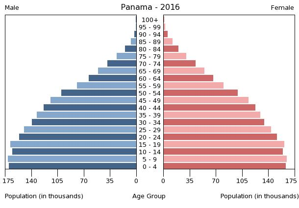 A population pyramid illustrates the age and sex structure of a country's population and may provide insights about political and social stability, as well as economic development. The population is distributed along the horizontal axis, with males shown on the left and females on the right. The male and female populations are broken down into 5-year age groups represented as horizontal bars along the vertical axis, with the youngest age groups at the bottom and the oldest at the top. The shape of the population pyramid gradually evolves over time based on fertility, mortality, and international migration trends.